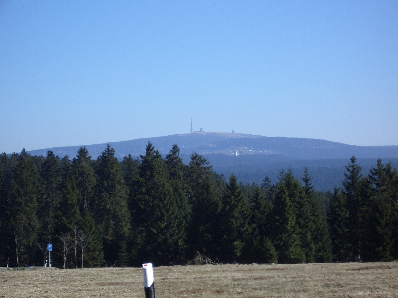 Brocken